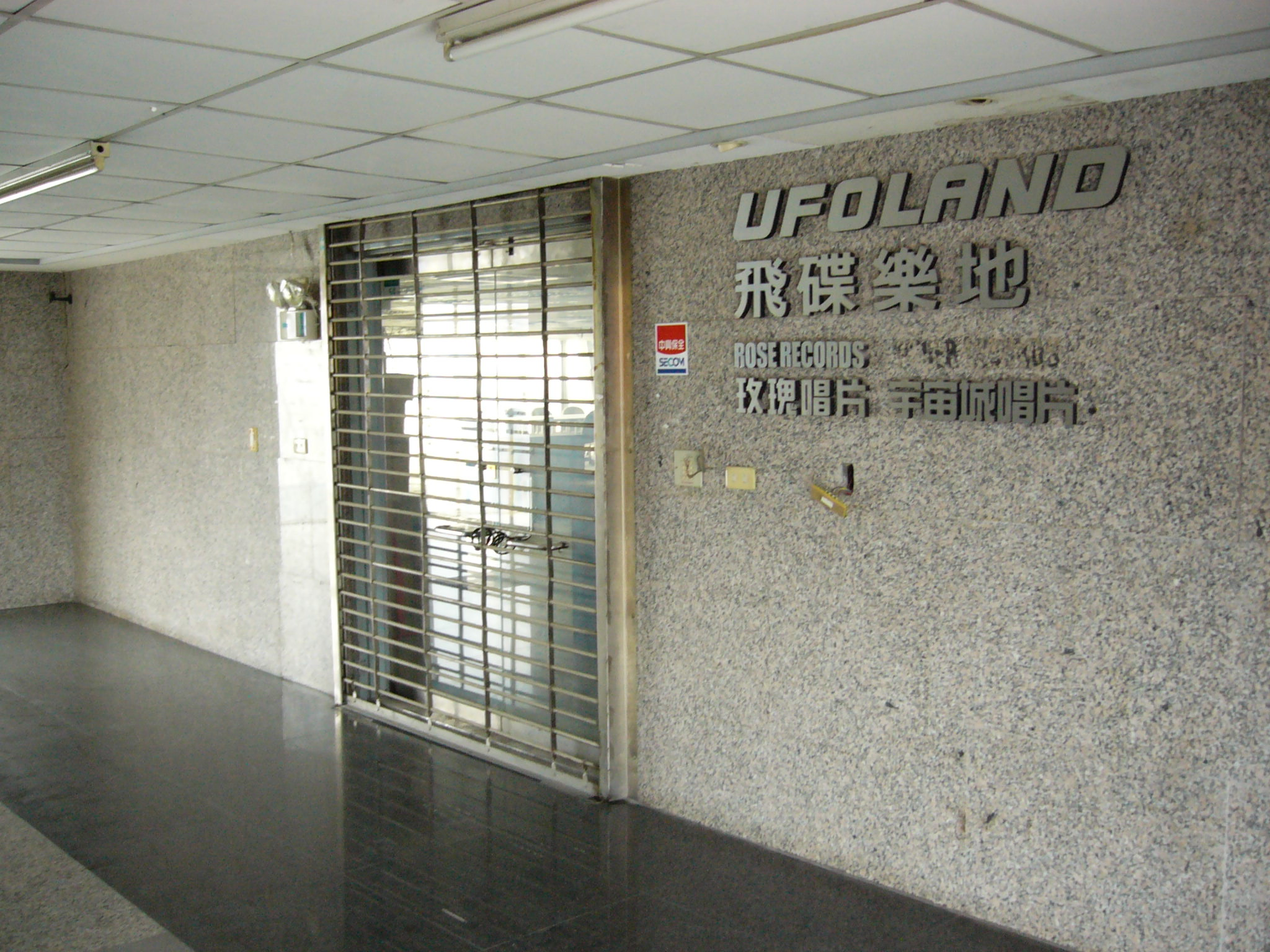 中文（台灣）: 玫瑰唱片舊總部，地址：臺北市中正區中華路一段59號6樓（英雄廣場商業大樓）。